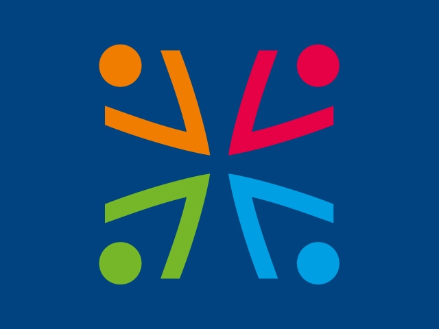 Logo Stabselement Chancengerechtigkeit der Bundeswehr